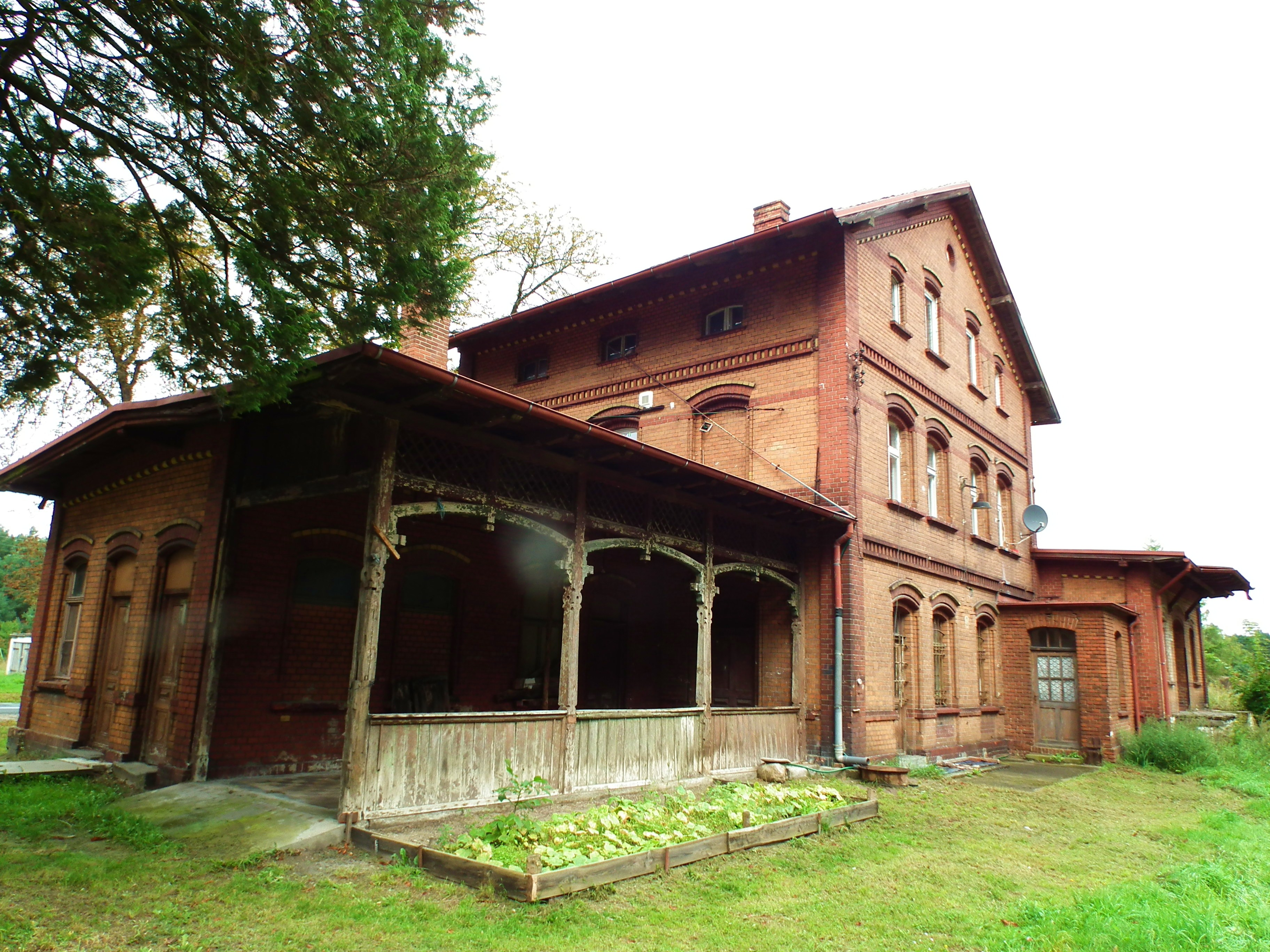 Stacja kolejowa w Przewozie - linia 380.